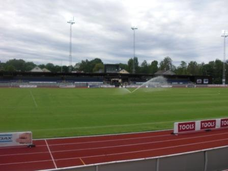 Finnvedsvallen i Värnamo